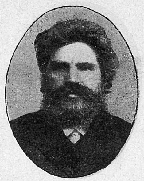 Павел Сергеевич Сигов (псевдоним SPS; 27 июля 1865, Пермская губерния — 1937, Екатеринбург) — учитель, акцизный чиновник, депутат II Государственной думы Российской империи от Пермской губернии (1907).